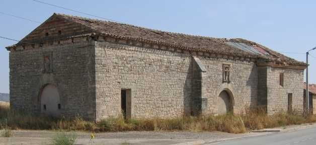 Ermita de la Veracruz en Presencio. Foto tomada por Sanbec